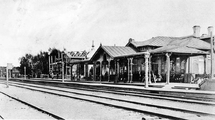 Станция Сиверская Северо-Западной ж.д. Отличия от оригинала: переведено в ч/б изображение, ретушировано, края обрезаны, зеркальное в гориз. пл. изображение